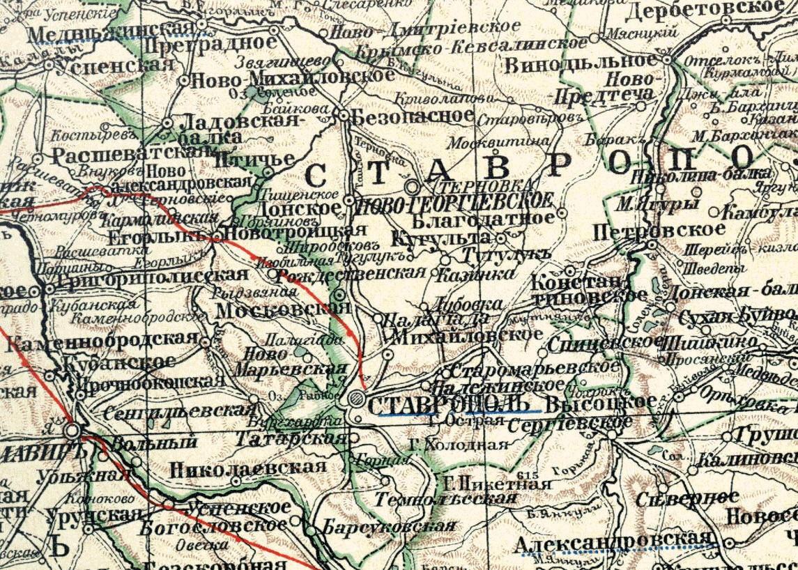 Новый настольный атлас А. Ф. Маркса. СПб., 1903